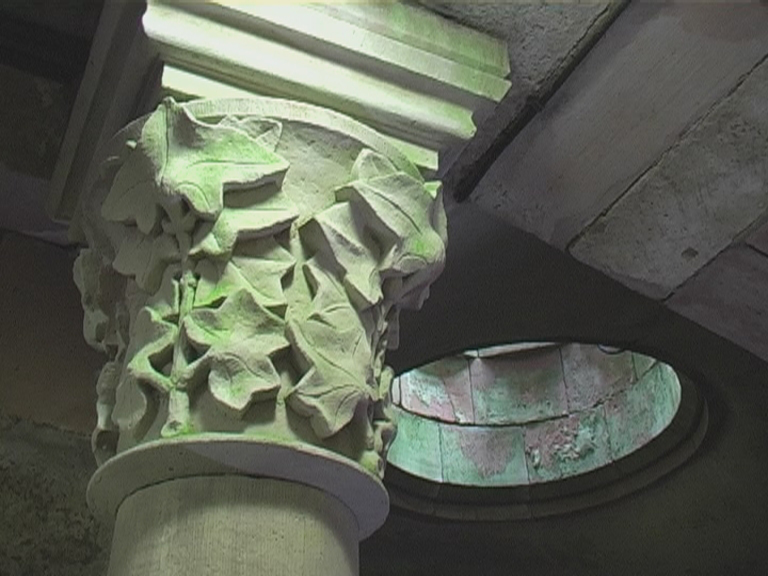 Kapitell einer Säule im Judenbad Friedberg (Hessen)